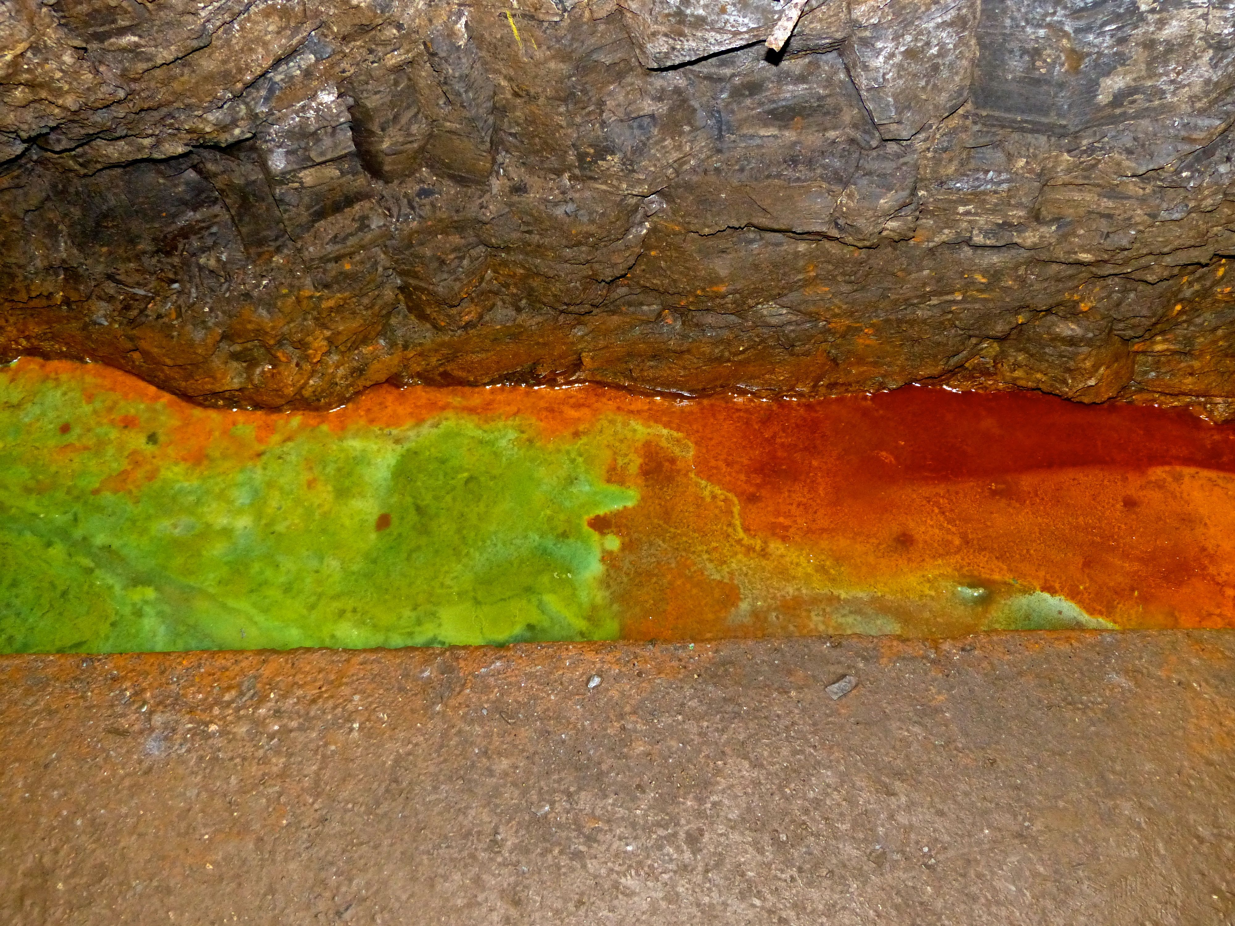 Kilianstollen Marsberg: Wasserseige in der Grube Oskar mit Kupfer- und Eisenmineralisation